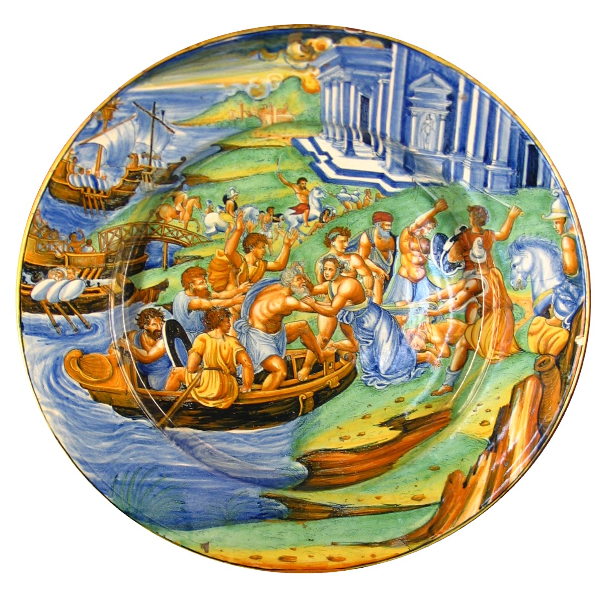 l'enlèvement d'Hélène - Plat en faïence décorée de Montelupo, Italie ca 1540-1545, Musée d'Ecouen, France.